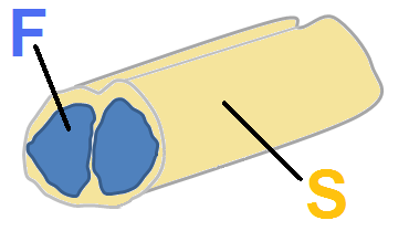 Other version of [File:Στάδια κατεργασίας μεταξιού.png] without tags